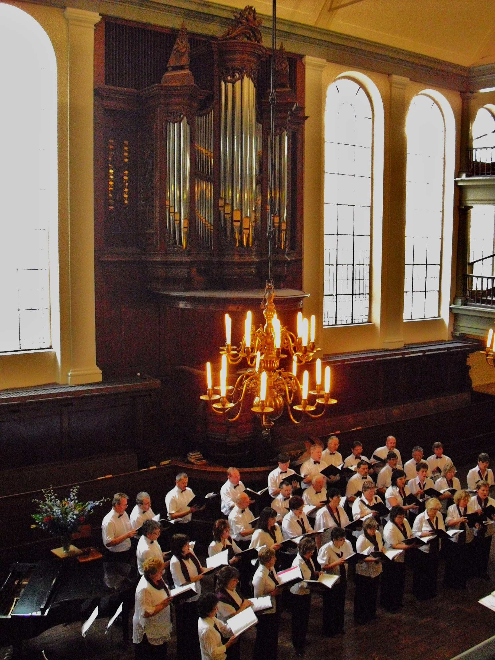 Mennonitische Singelkerk Amsterdam "het Lam"